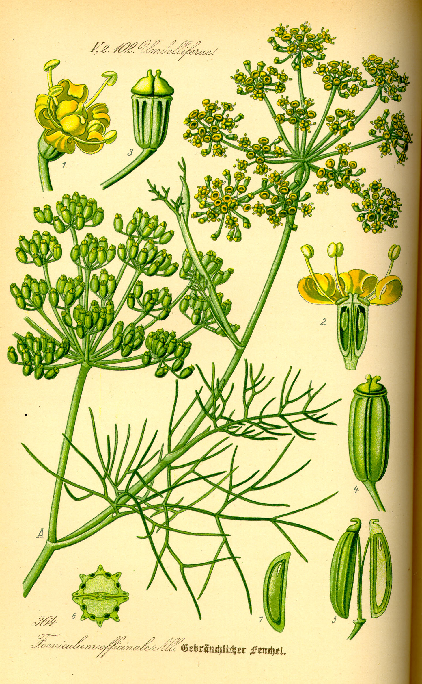 Foeniculum vulgare